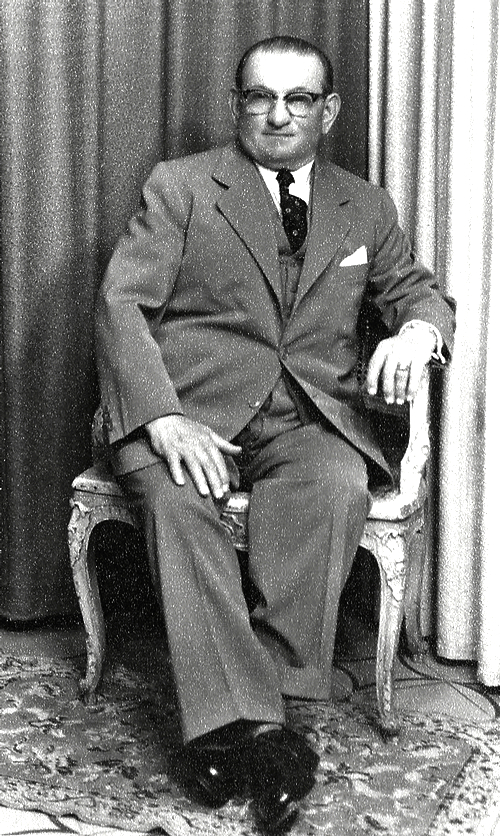 El empresario José Ferrarini en los años '30 aproximadamente.